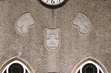 herby na froncie ratusza